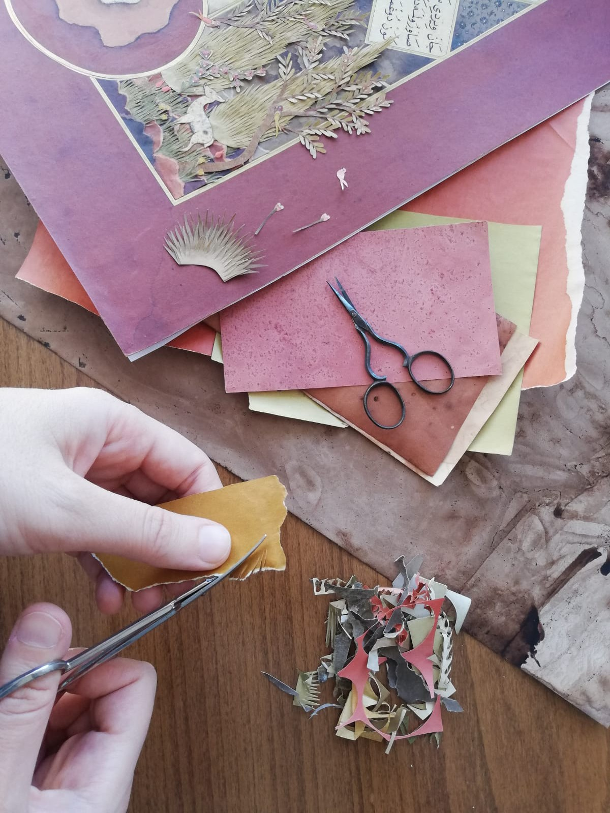 Ümmügülsüm Sevim Gencer'in Kat'ı Tasarım Atölyesinden Bir Kesit